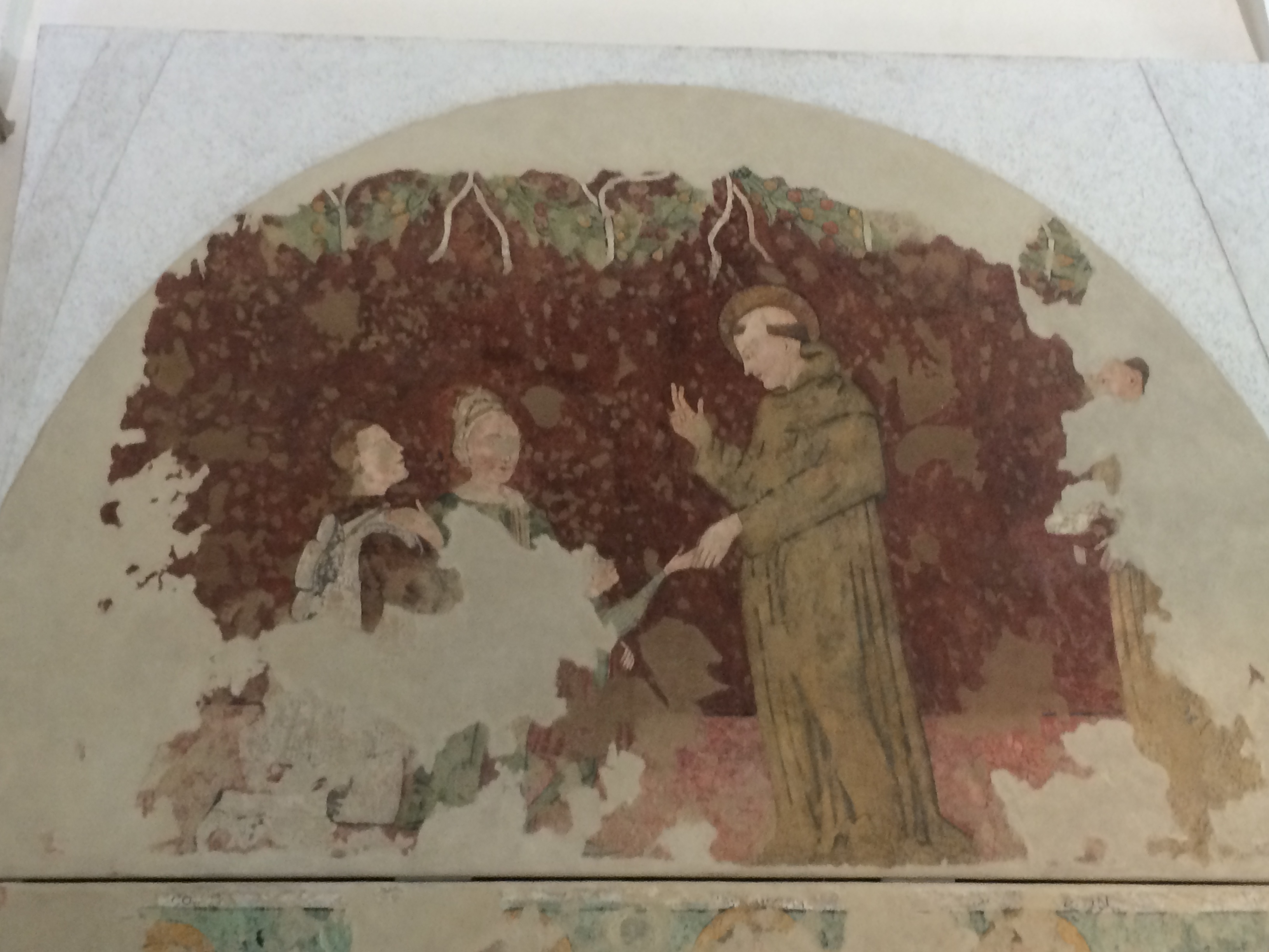 Abbazia di Rosazzo - affresco staccato presente nella chiesa